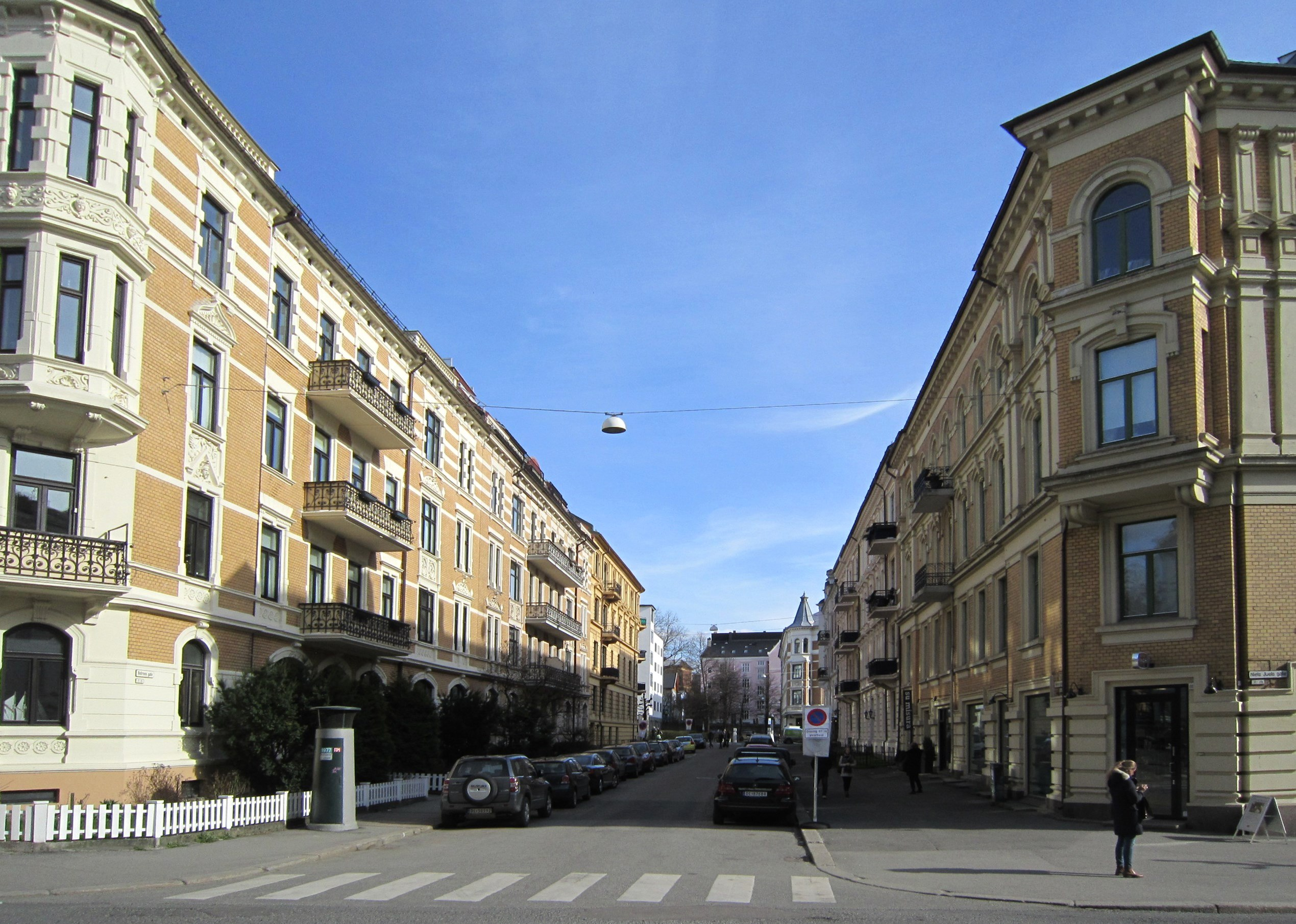 Behrens' gate sett fra Niels Juels gate